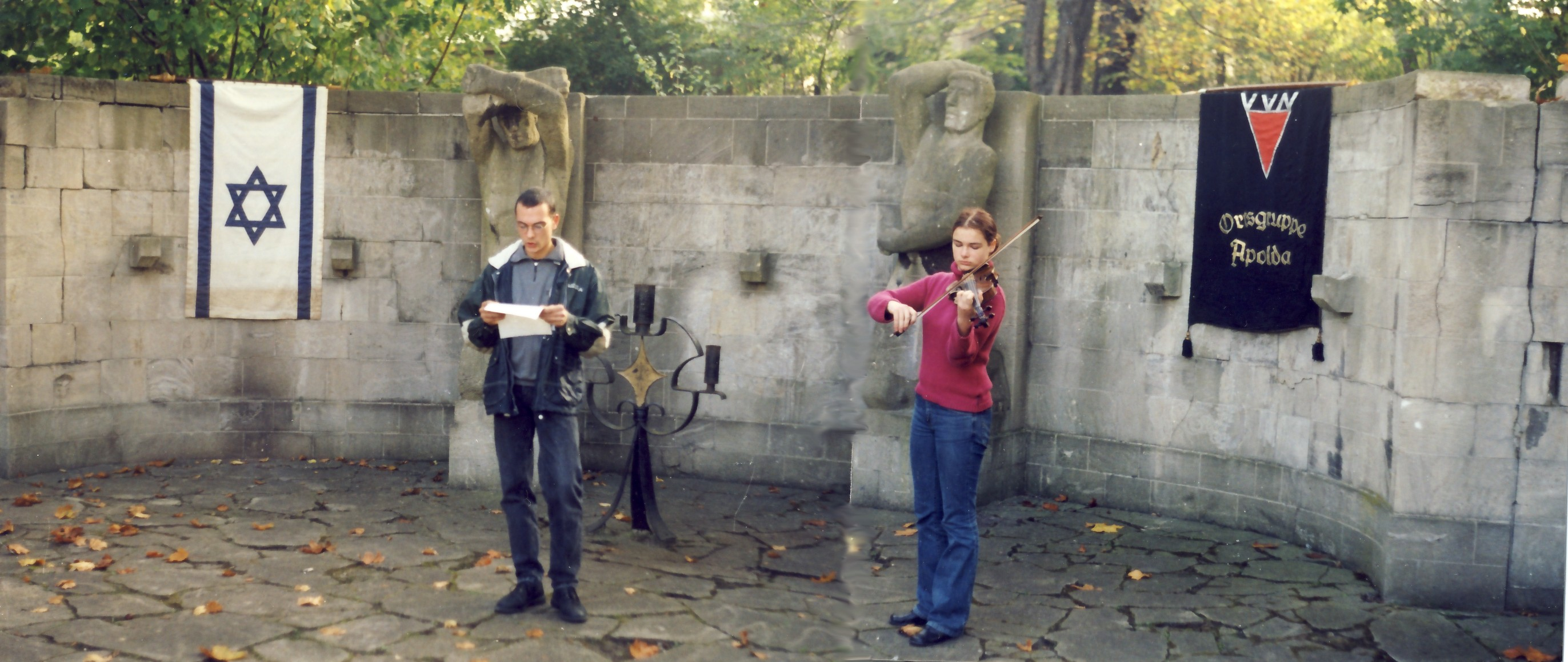 OdF-Denkmal_Bahnhofstraße